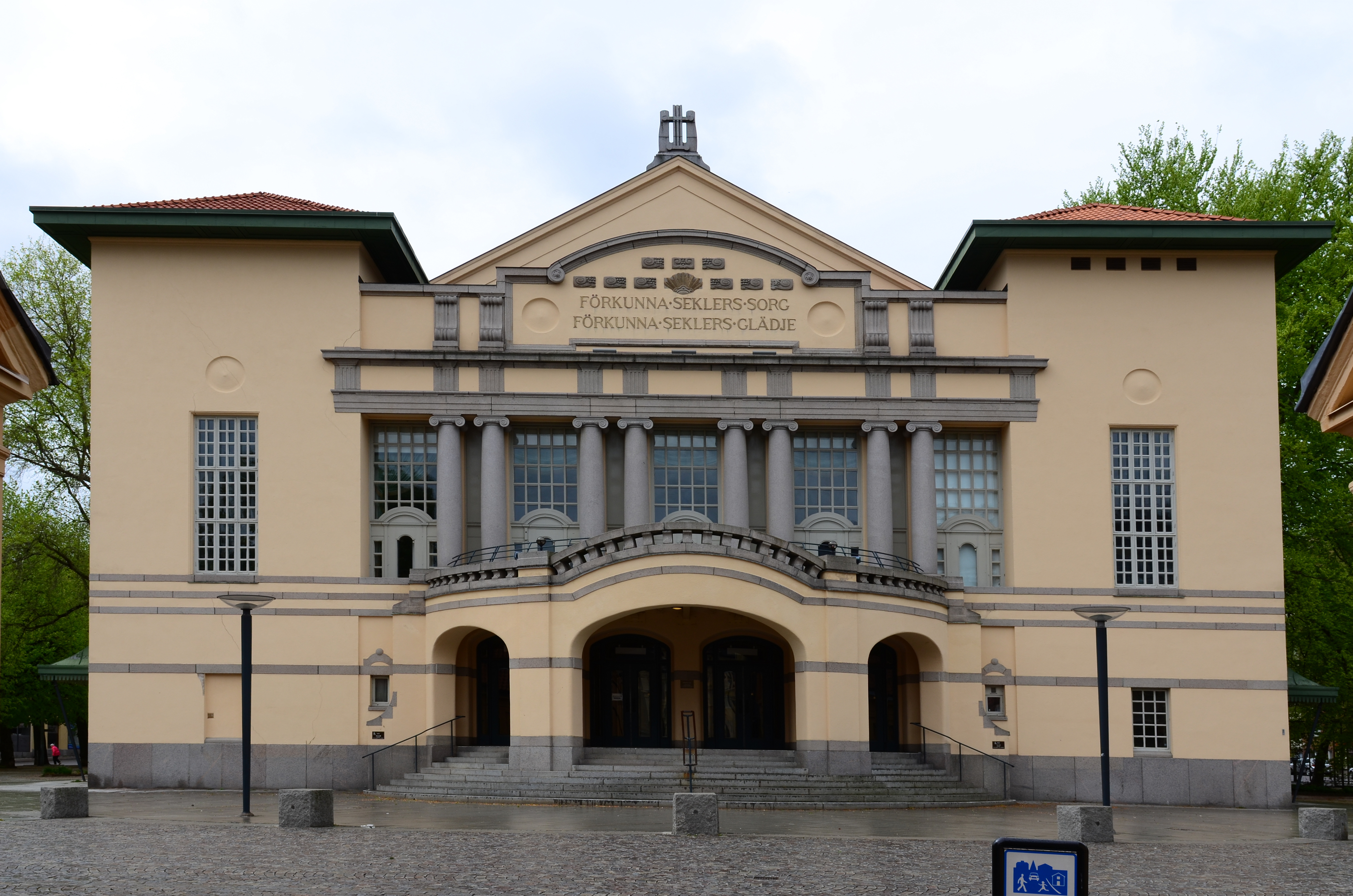 Stora teatern i Norrköping in Norrköping, drafted by Axel Anderberg